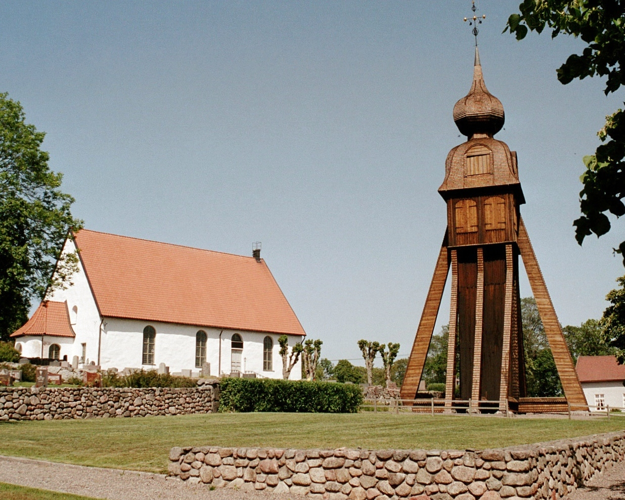 Karlstorps kyrka med klockstapeln